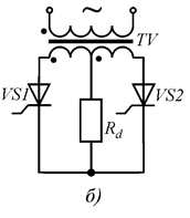 Файл запозичений з конспекту лекцій з курсу "Енергетична елетроніка" факультету електроніки НТУУ"КПІ".